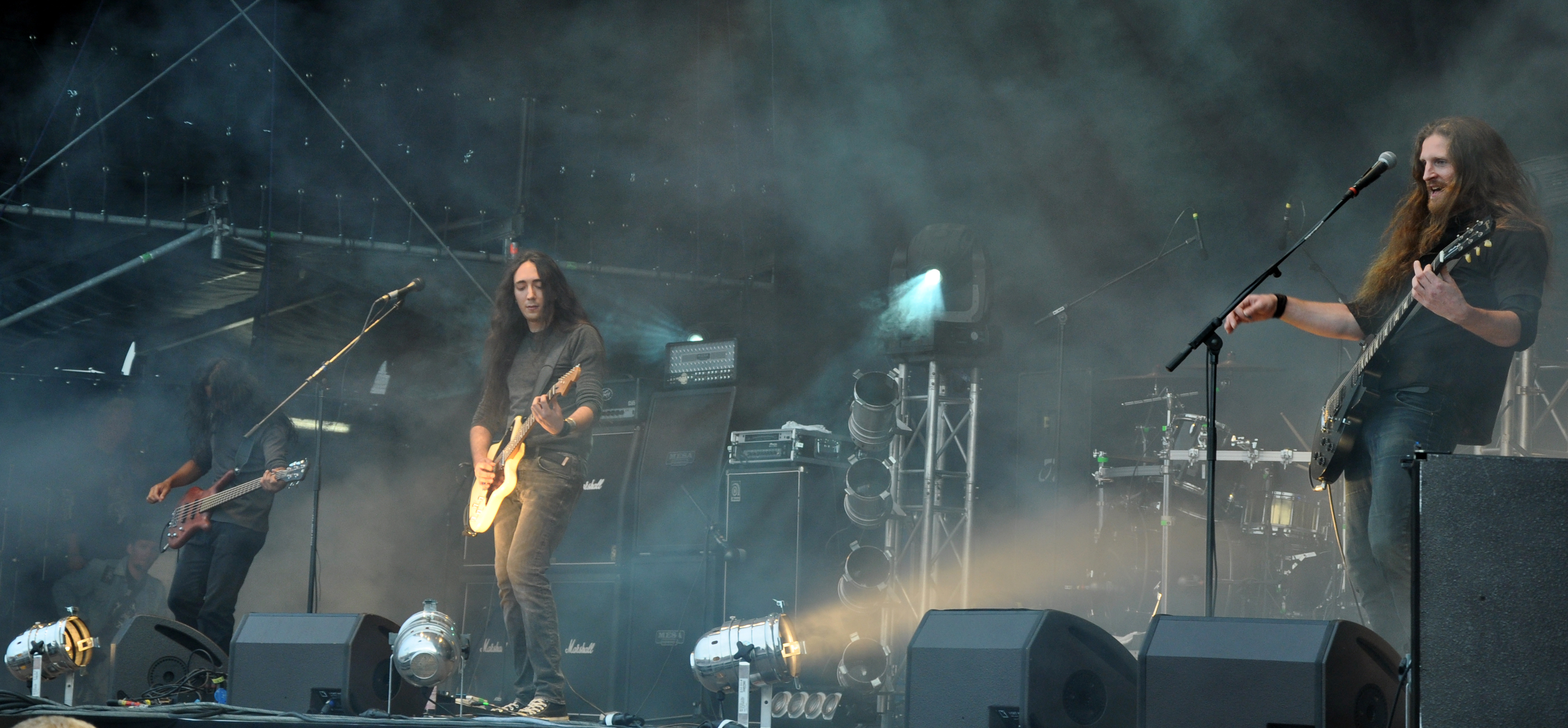 Alcest at Party.San Metal Open Air 2013